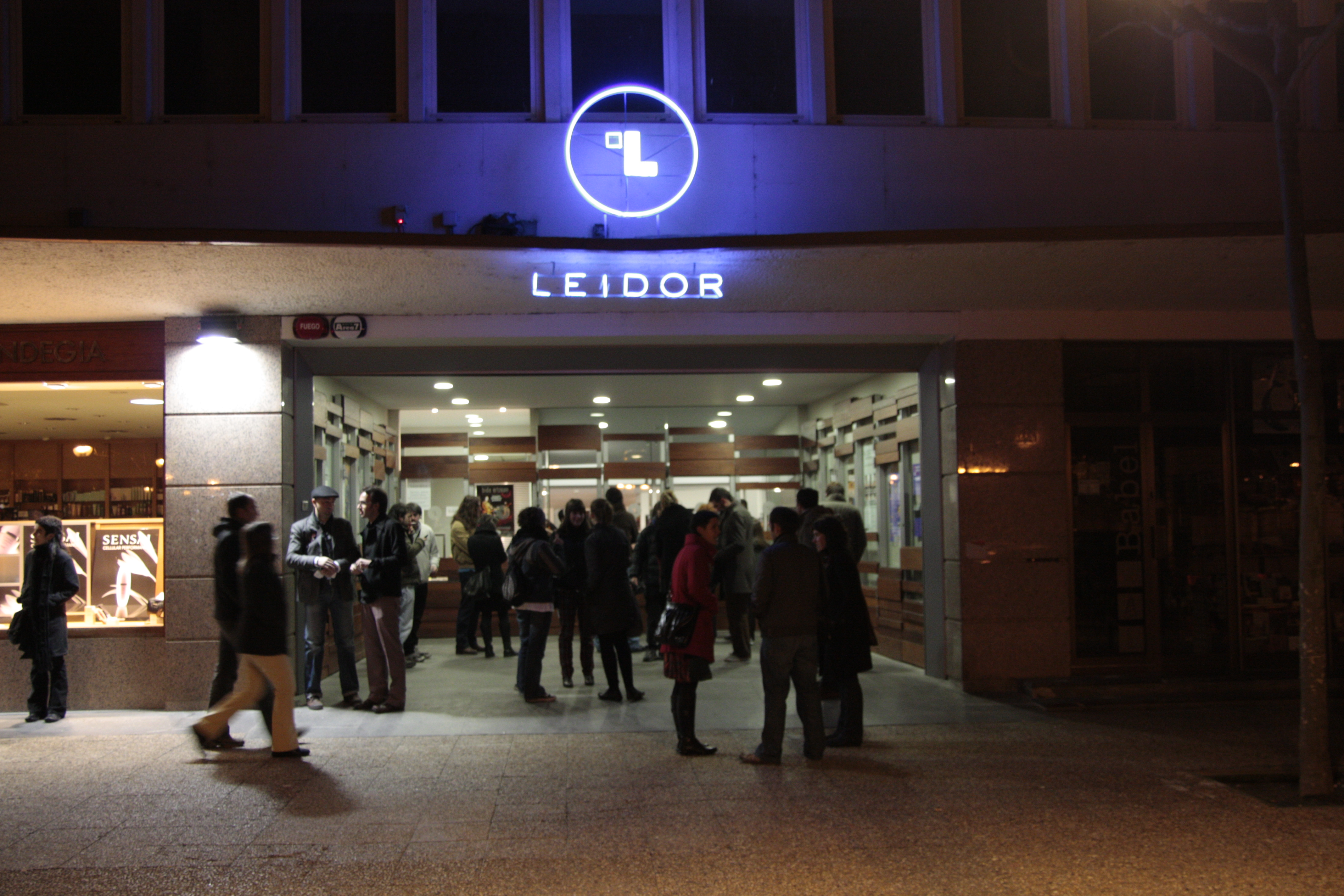 Leidor antzokiaren sarrera